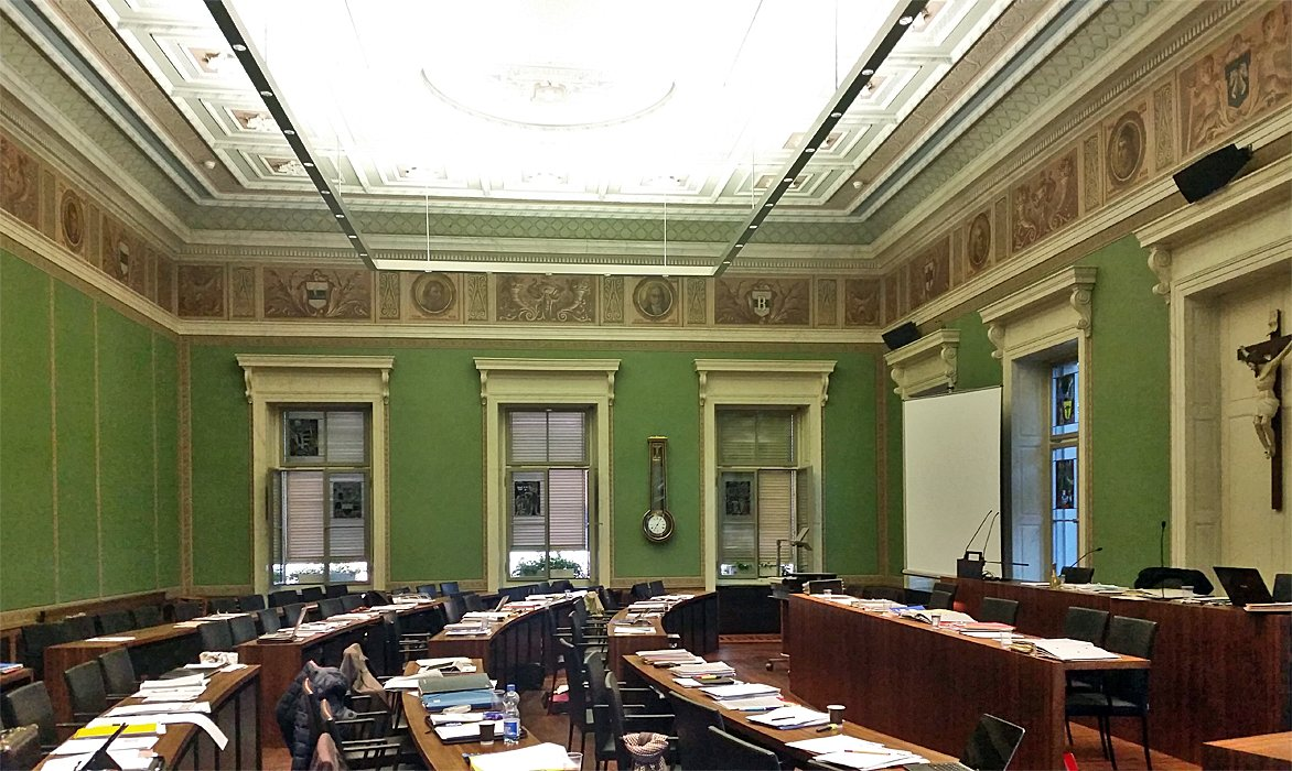 Der Parlamentssaal im Regierungsgebäude in Zug